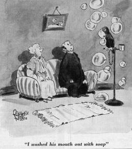 1937 cartoon